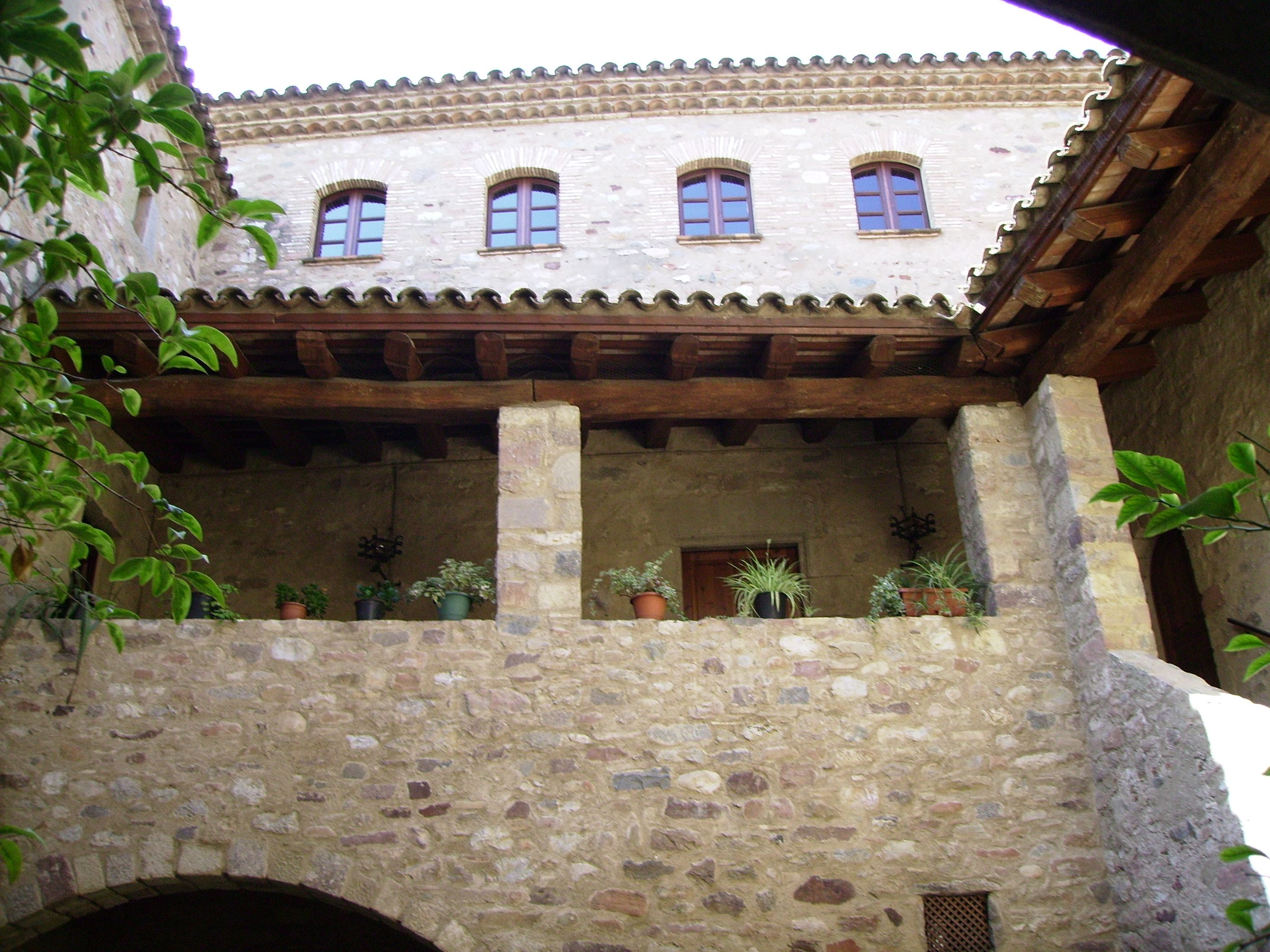 Galeria del Pati d'armes el qual és petit